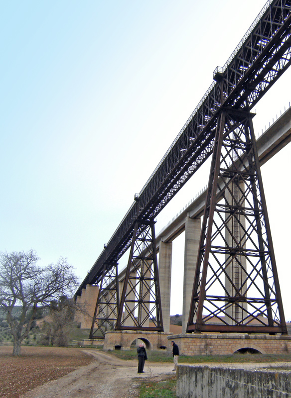 Puente del Hacho, en Guadahortuna (Granada, España). Es el puente metálico más largo de la Península Ibérica. Construido por ingenieros franceses en la década de 1890, forma parte de la vía ferrea Granada-Linares.